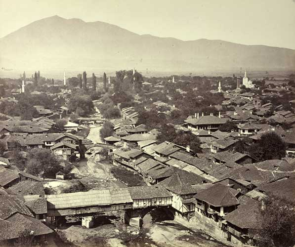 Prizreni 1860